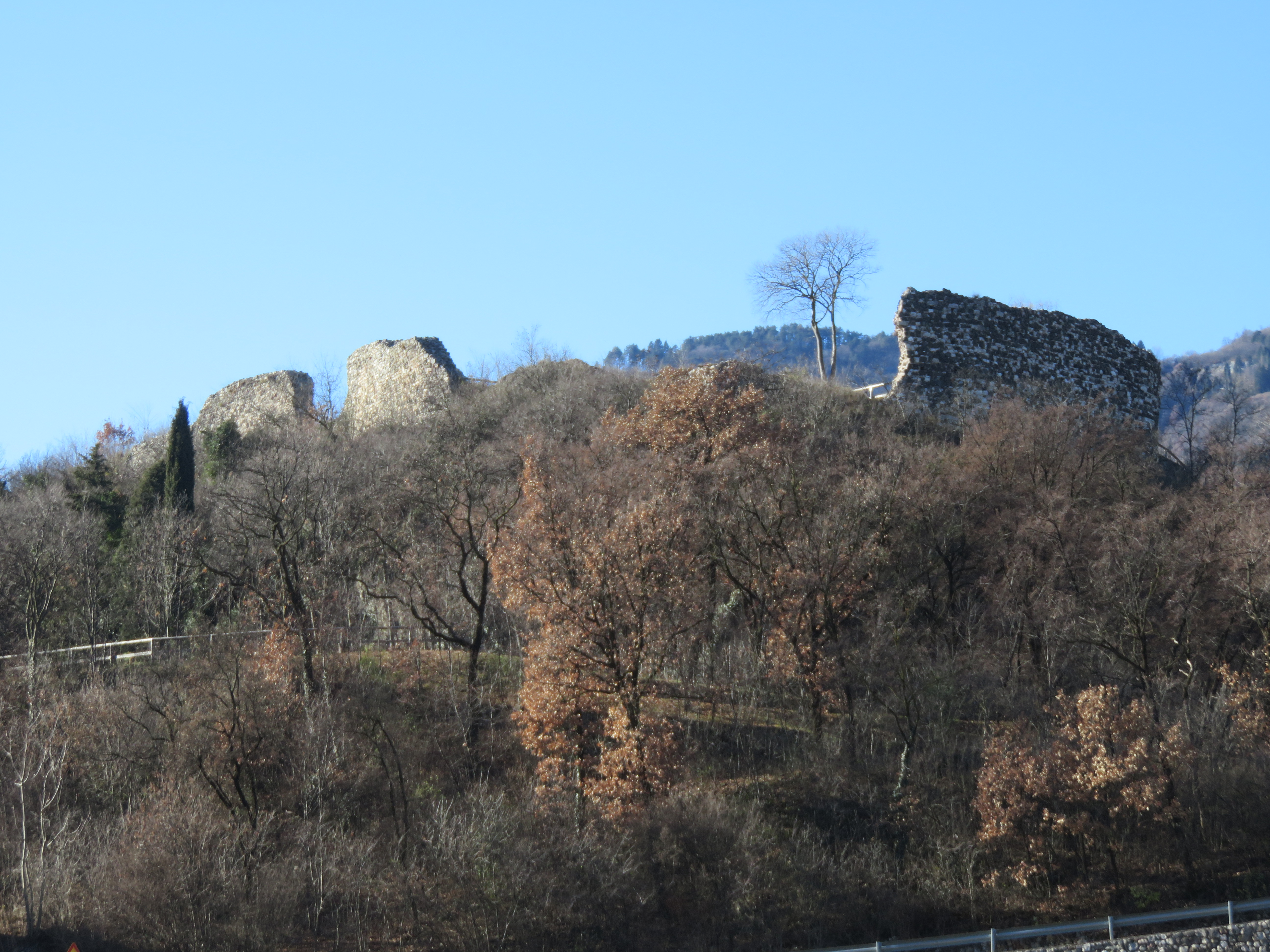 Castel Pradaglia da Località Casote, Isera